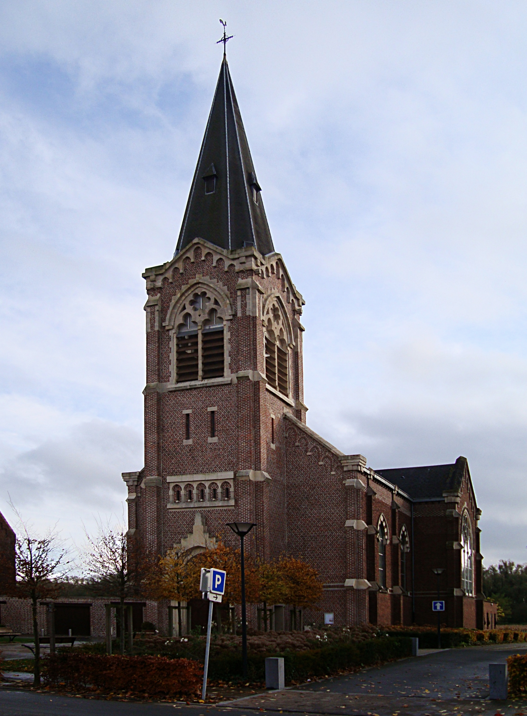 L'église Saint-Martin de Hantay (Nord). Détruite pendant la première guerre mondiale, elle a été reconstruite après 1918.